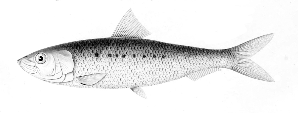 Sardinops sagax